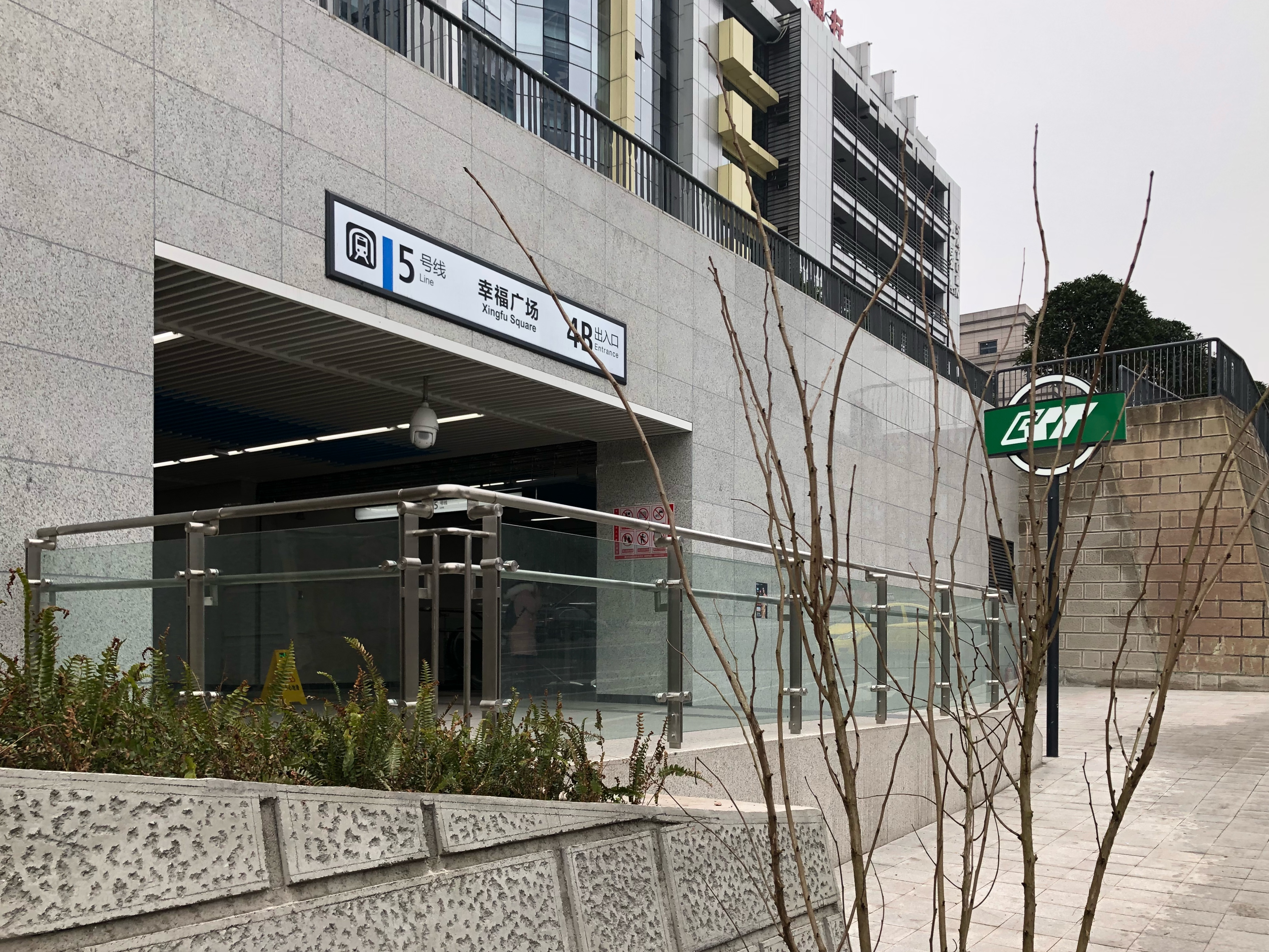 中文（中国大陆）: 5 号线幸福广场站 4B 出口